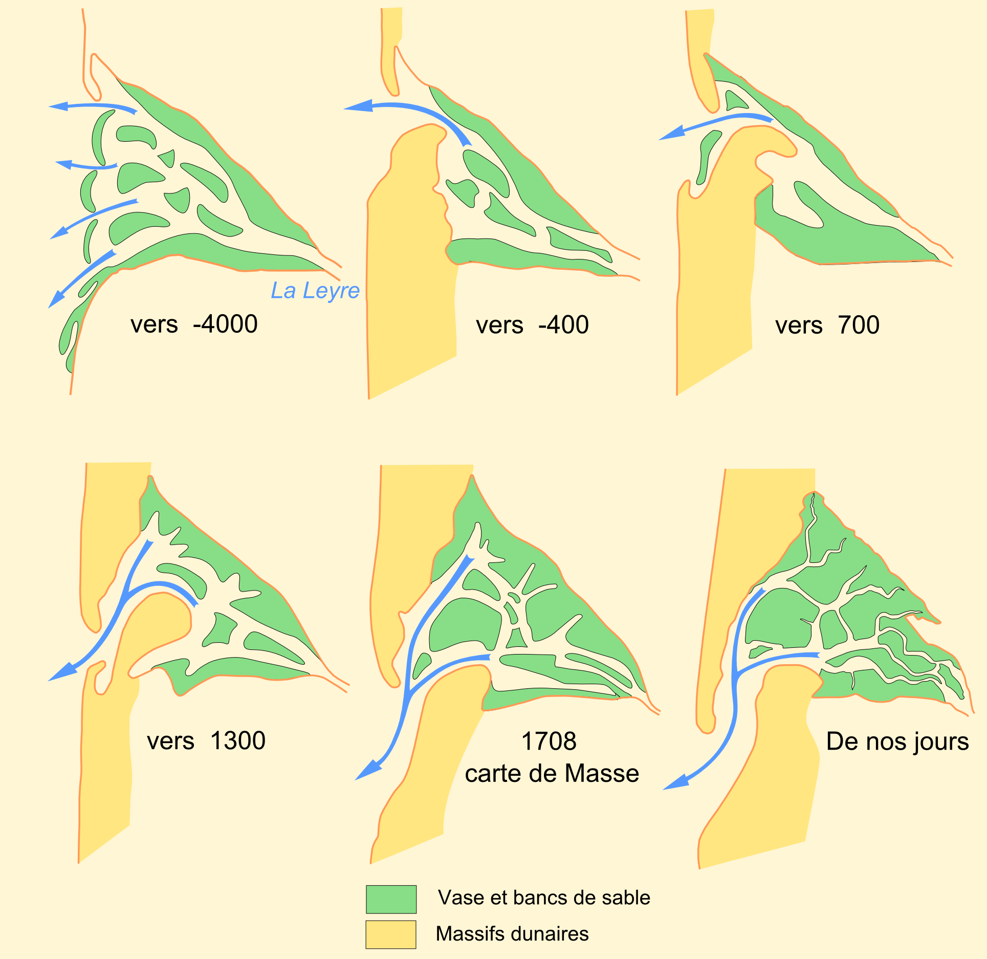 Schéma expliquant la formation du Bassin d'Arcachon (Gironde, France)